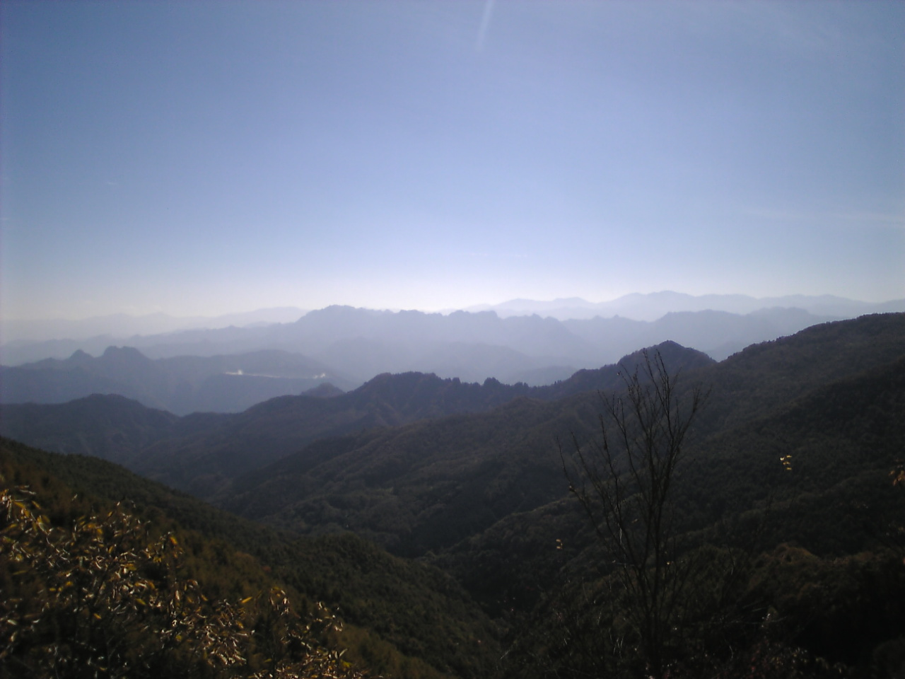 御荷鉾山にある御荷鉾スーパー林道から南を望む。座標は推定です。